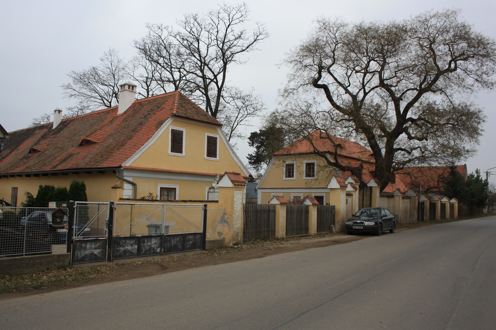 Památník Bedřicha Smetany v Semilkovicích, části Obříství.